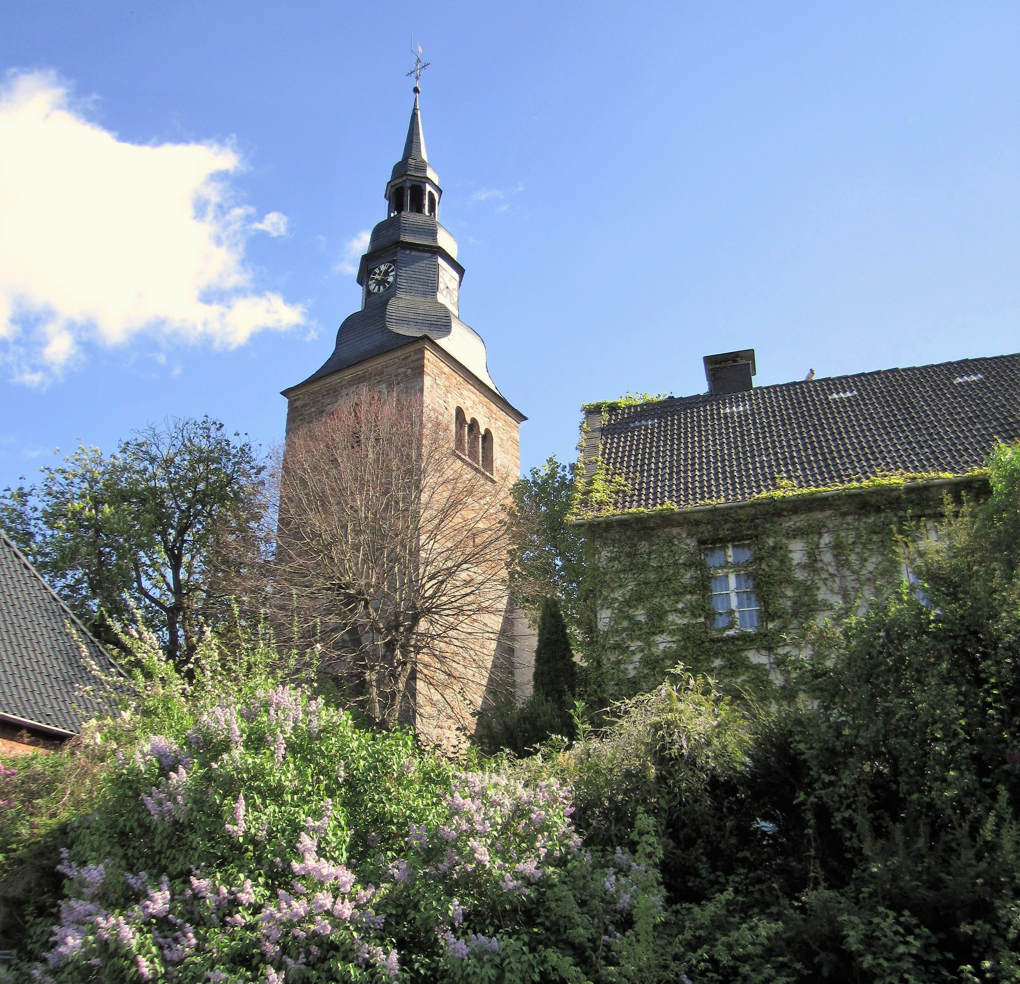 Denkmalgeschütztes begrüntes ehemaliges Kurienhaus des Klosters Elsey in Hagen-Hohenlimburg, Elseyer Kirchplatz 2 (Rückseite Fachwerk). Wohnhaus der Äbtissin von Syberg (Amtszeit 1641–1684). Links der Turm der Evangelischen Kirche Elsey (ehemalige Stiftskirche). This is a photograph of an architectural monument.